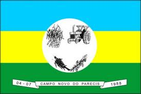 Bandeira de Campo Novo do Parecis